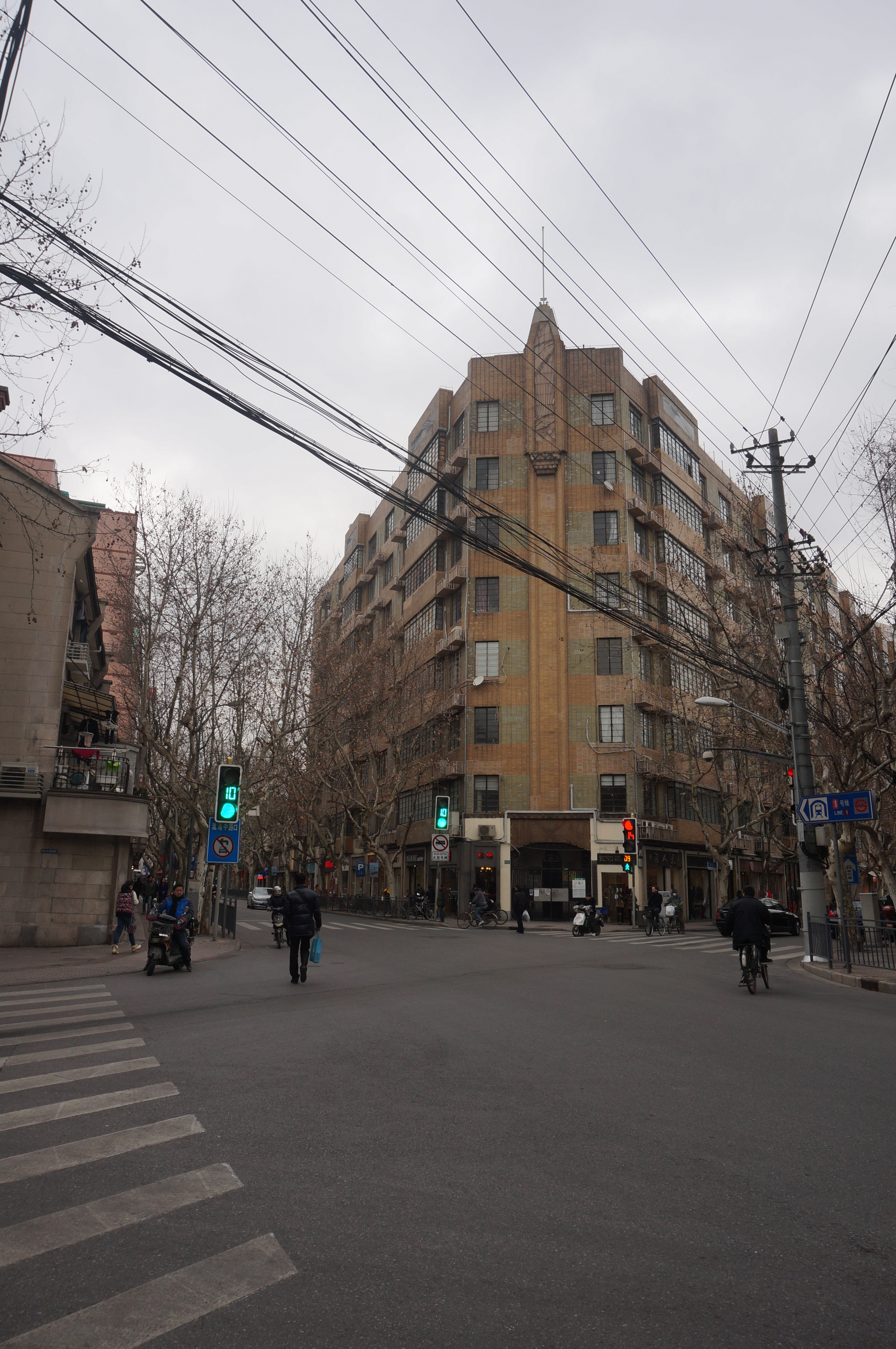 中文（中国大陆）: 上海南昌大楼